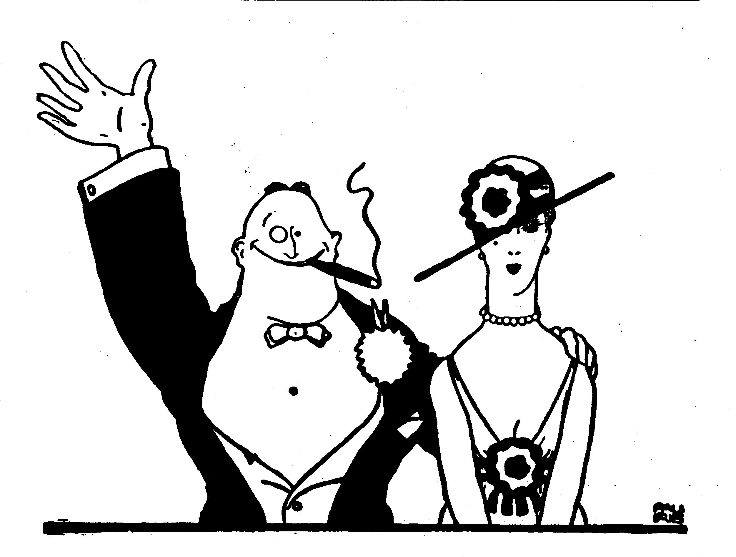 Illustration publicitaire